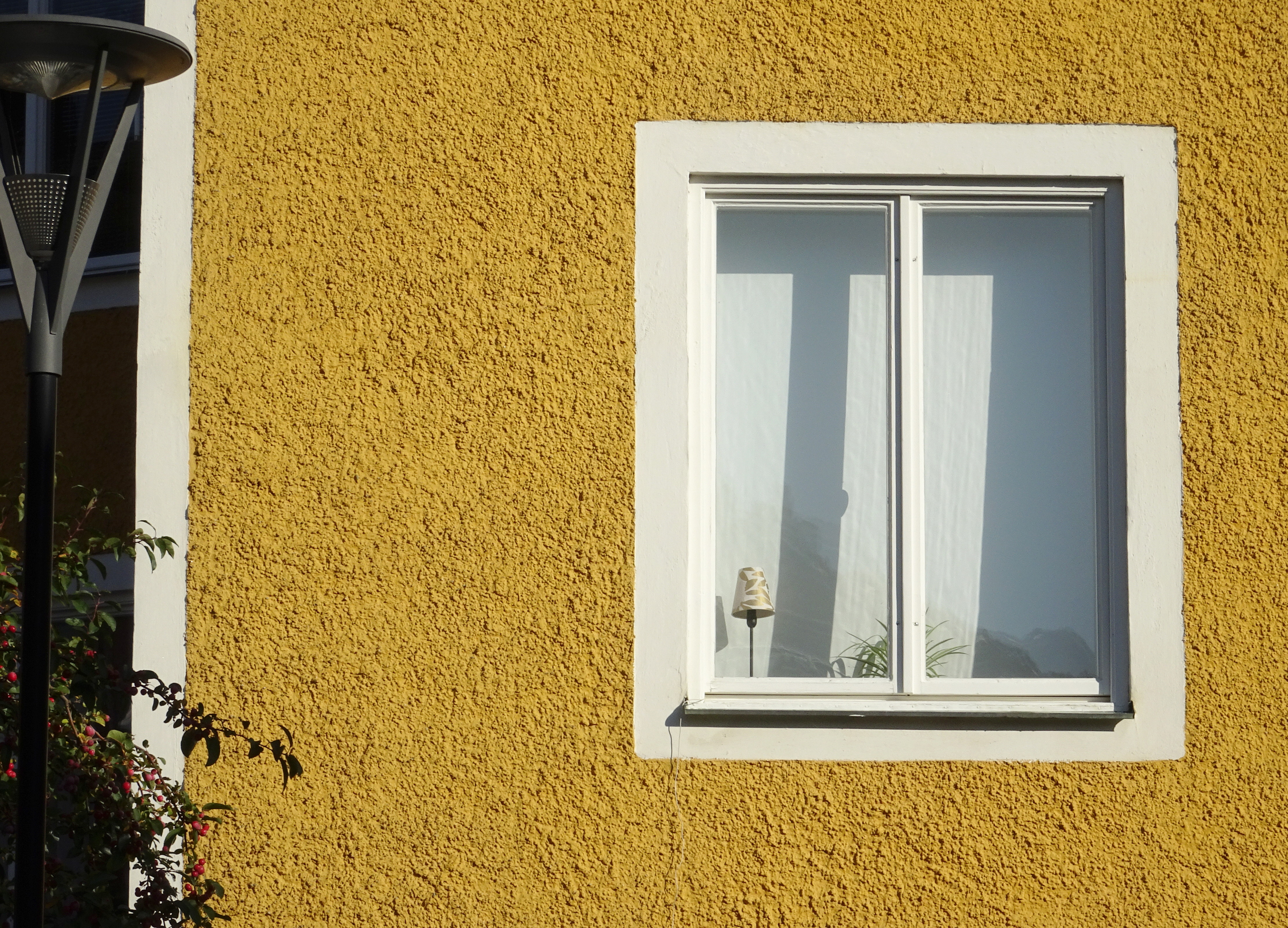 Gröndals stjärnhus, arkitekt Backström & Reinius